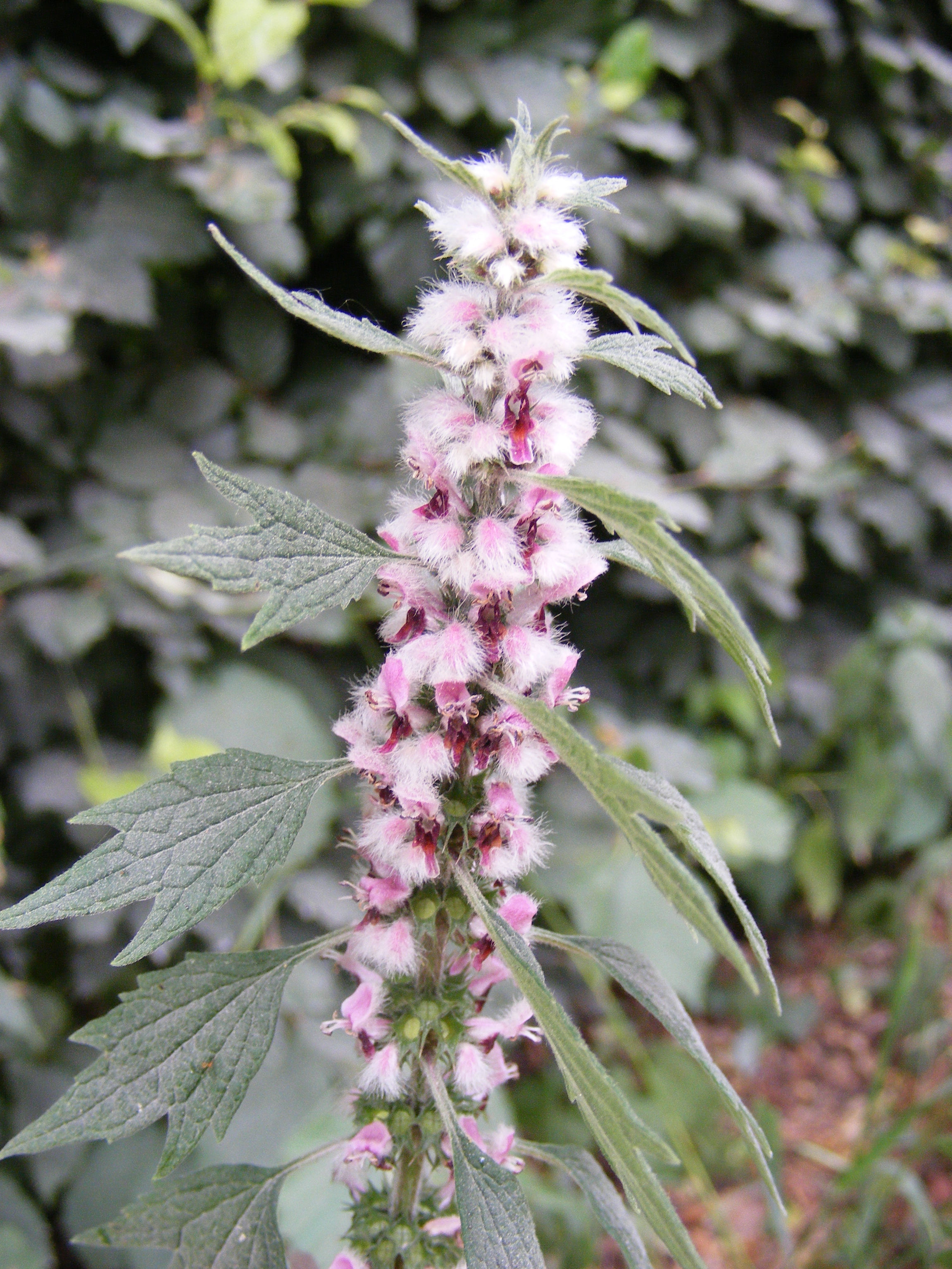 Hartgespan, gefotografeerd in Wageningen, 3-7-2010 Leonurus cardiaca